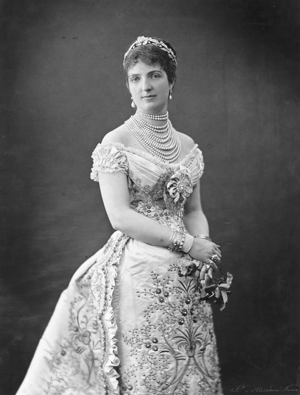 Regina Margherita di Savoia